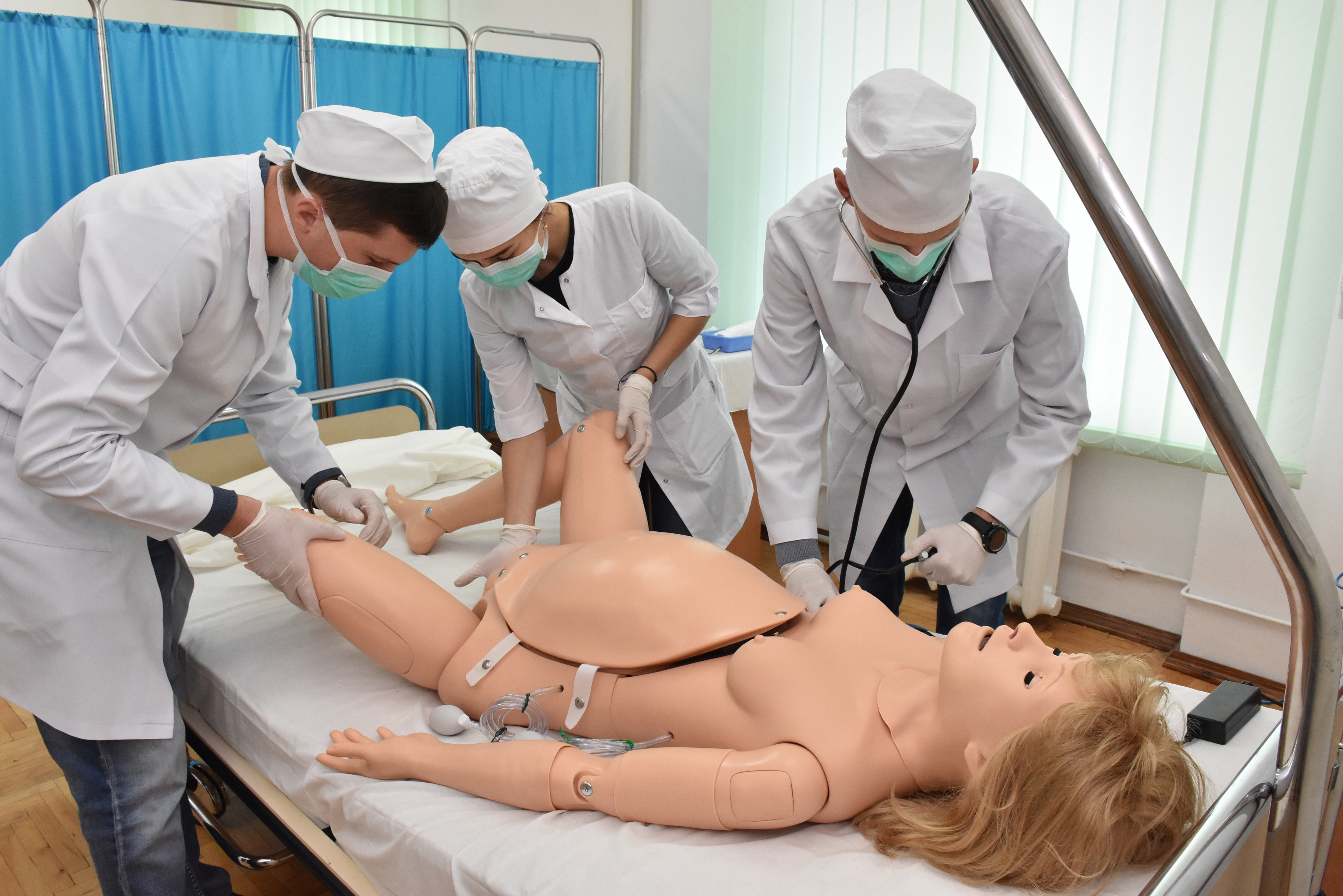 Студенти на заняттях у центрі симуляційного навчання Тернопільського державного медичного університету імені І. Я. Горбачевського.